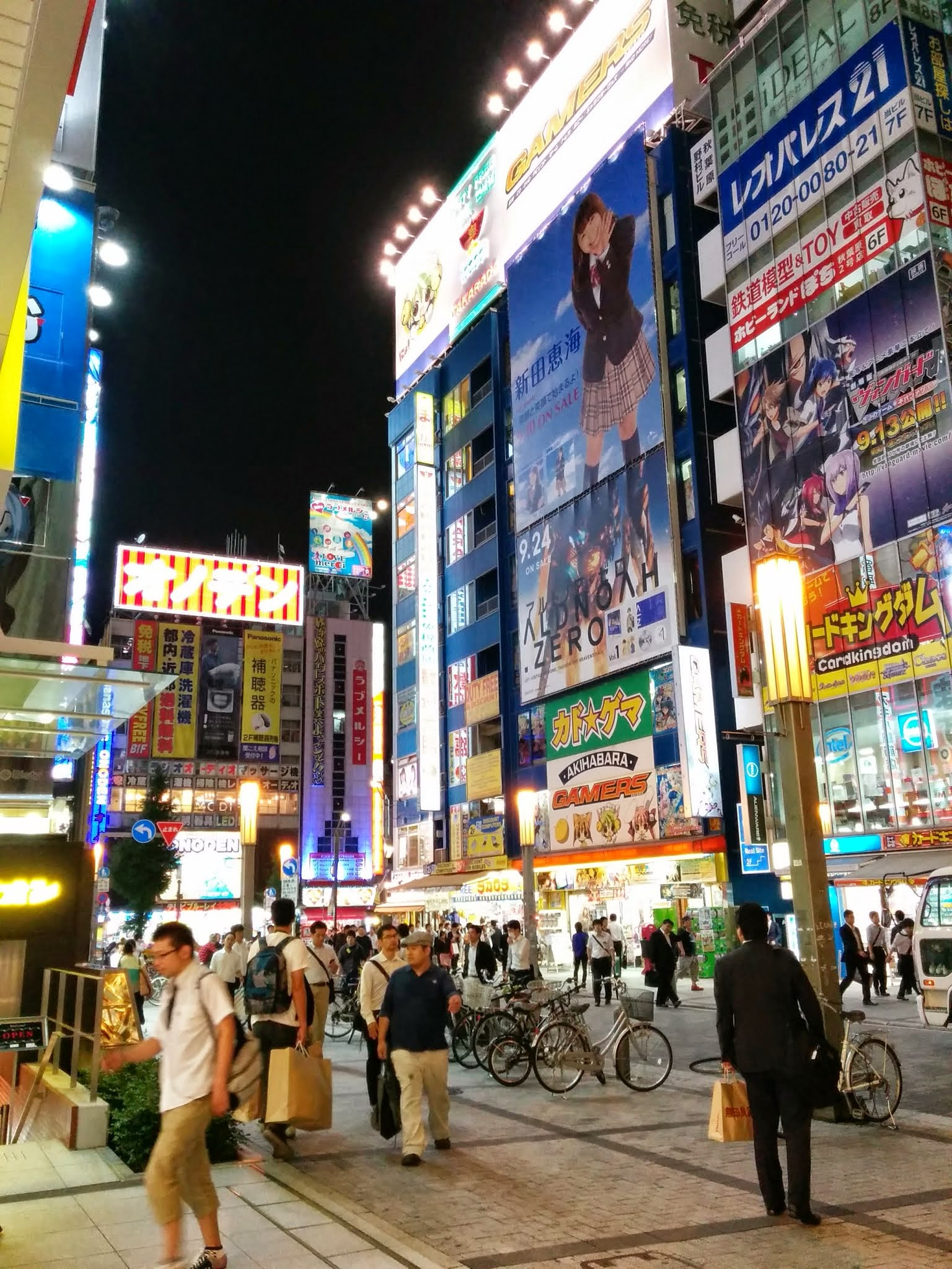 Kaufhäuser in Akihabara in Tokio